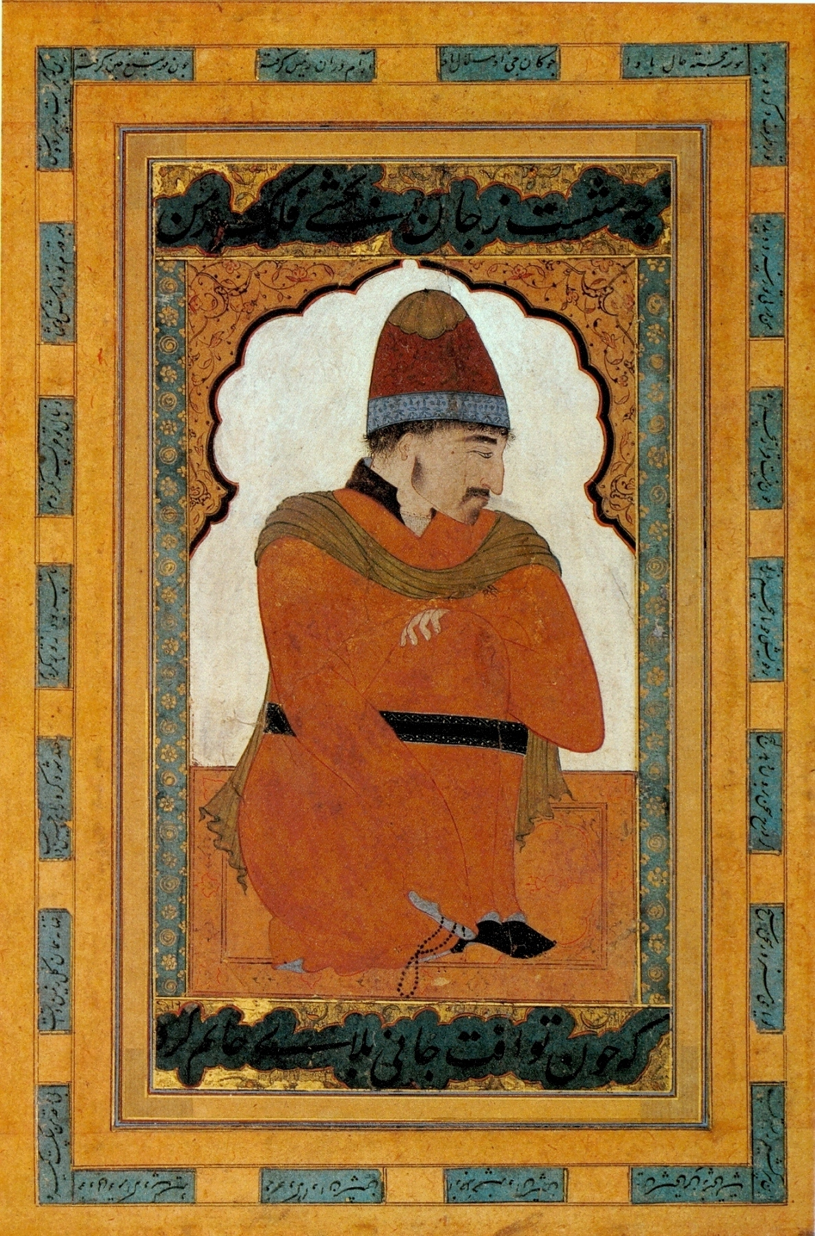 Shaykhzada_Портрет_суфия._Бухара._1535._